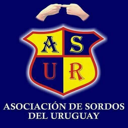 Logo de ASUR